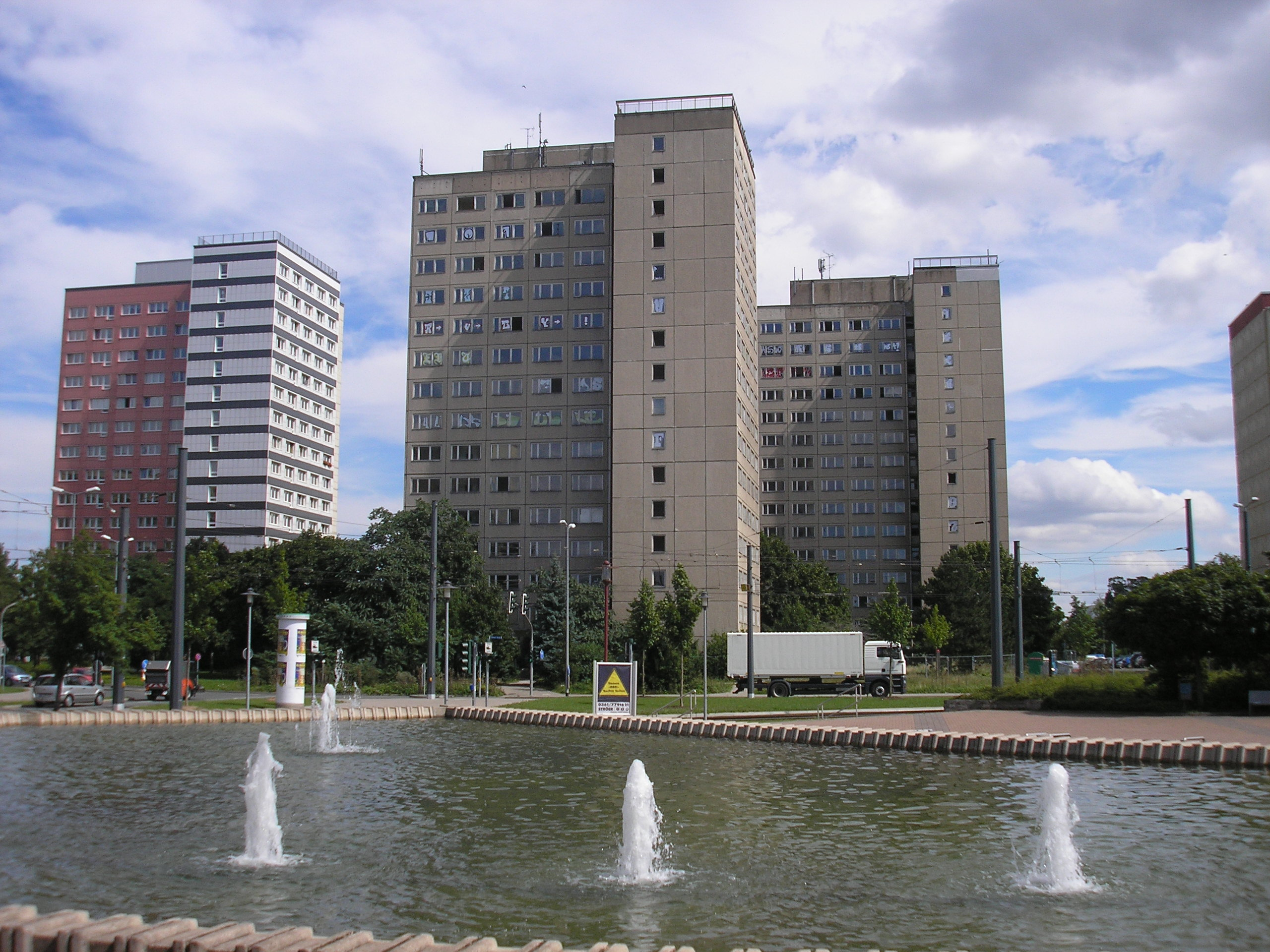 Drei Punkthochhäuser (PH 16) in der Mainzer Straße bzw. Kasseler Straße im Erfurter Stadtteil Rieth.